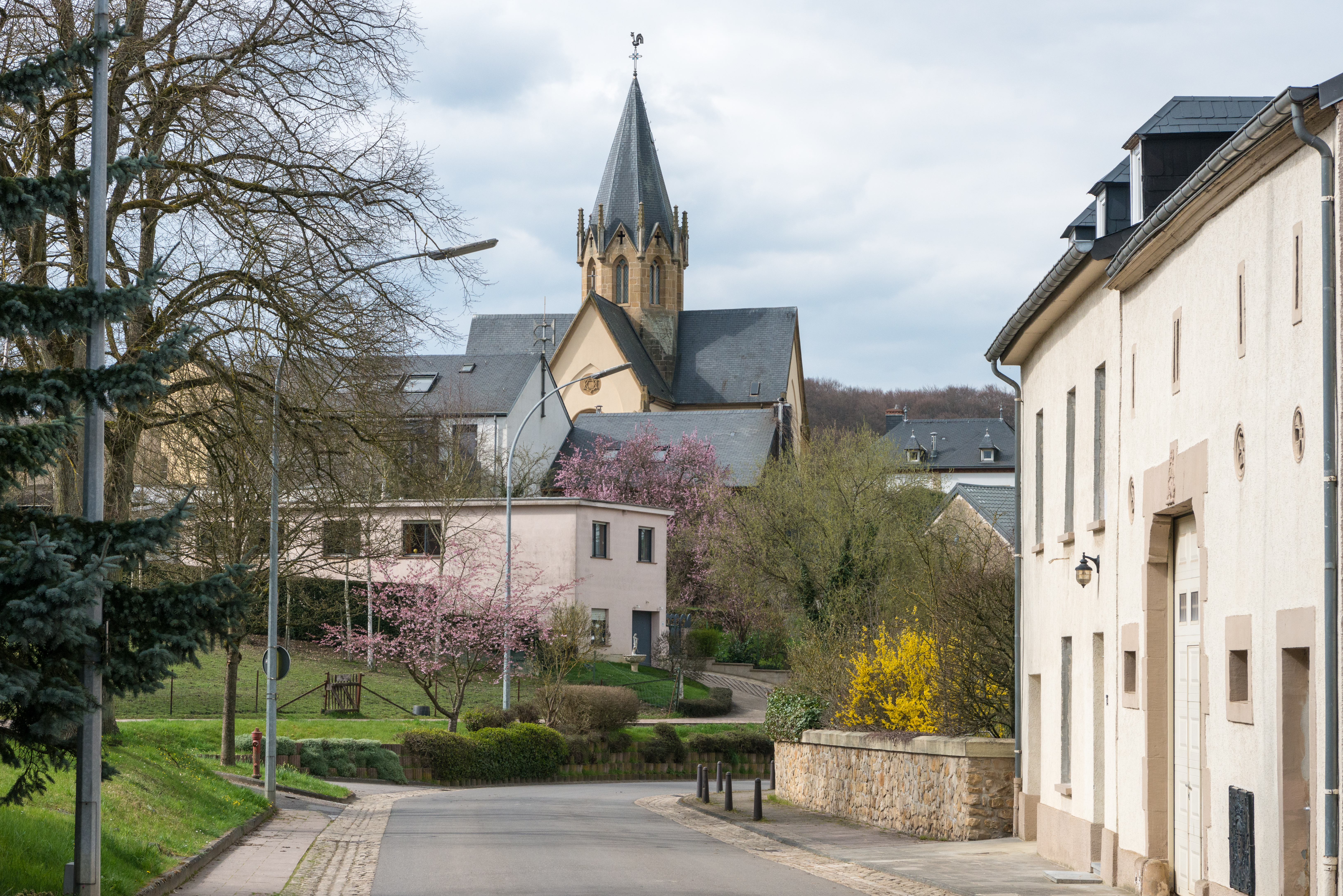 7, rue de Dalheim, Siren.